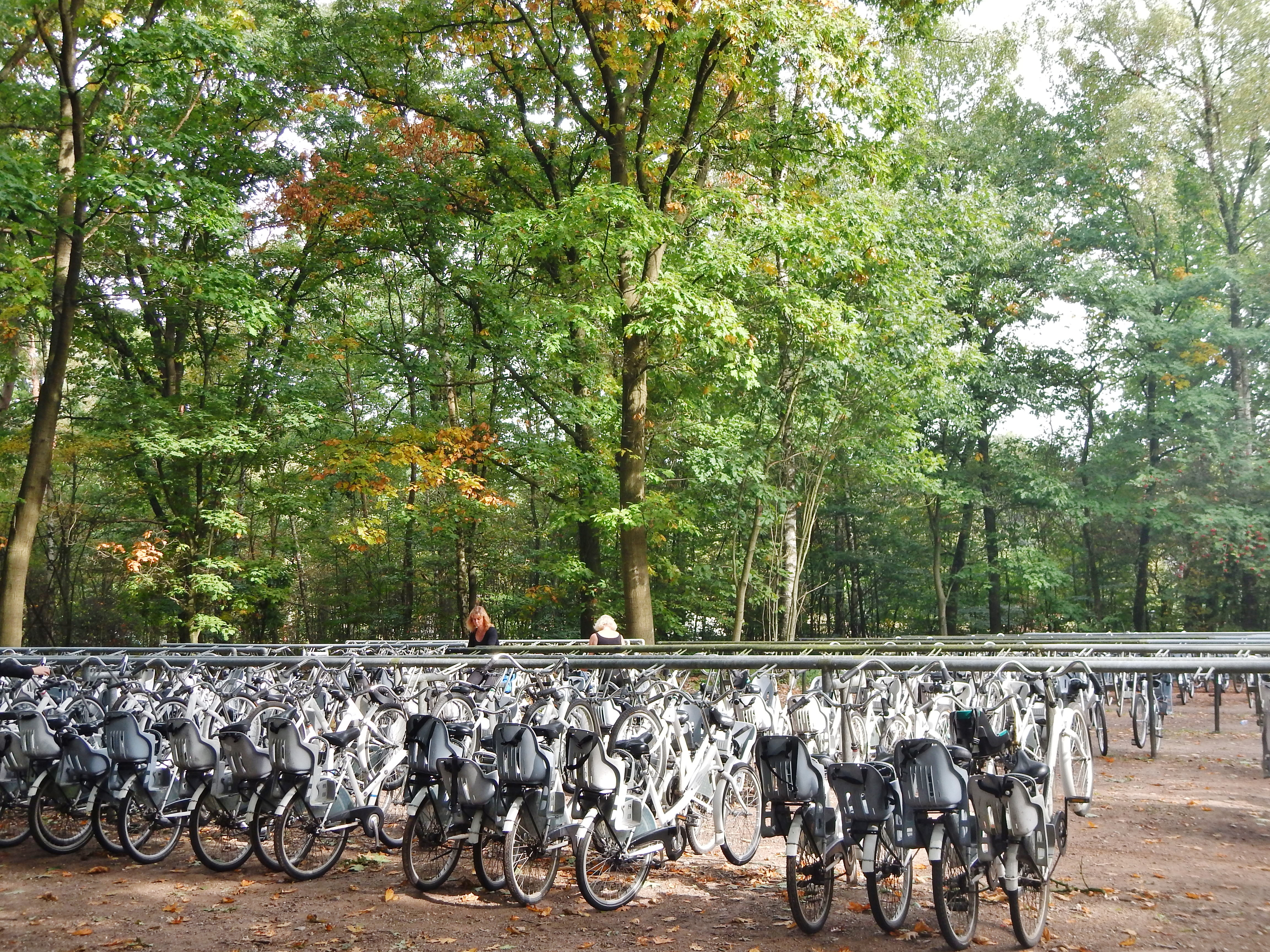 Fietsenstalling im Hoge Veluwe National Park